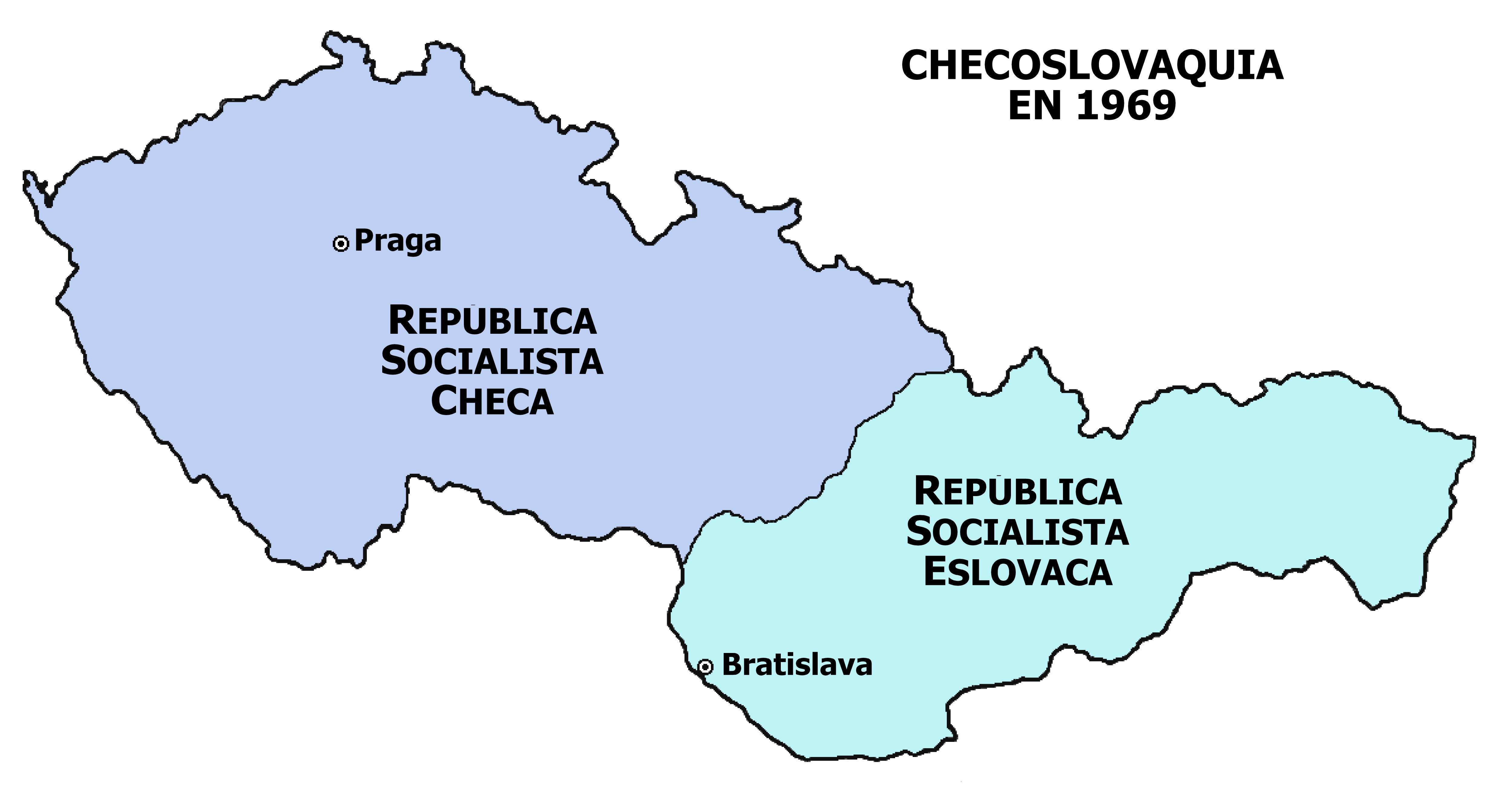 Mapa de Checoslovaquia (self made)